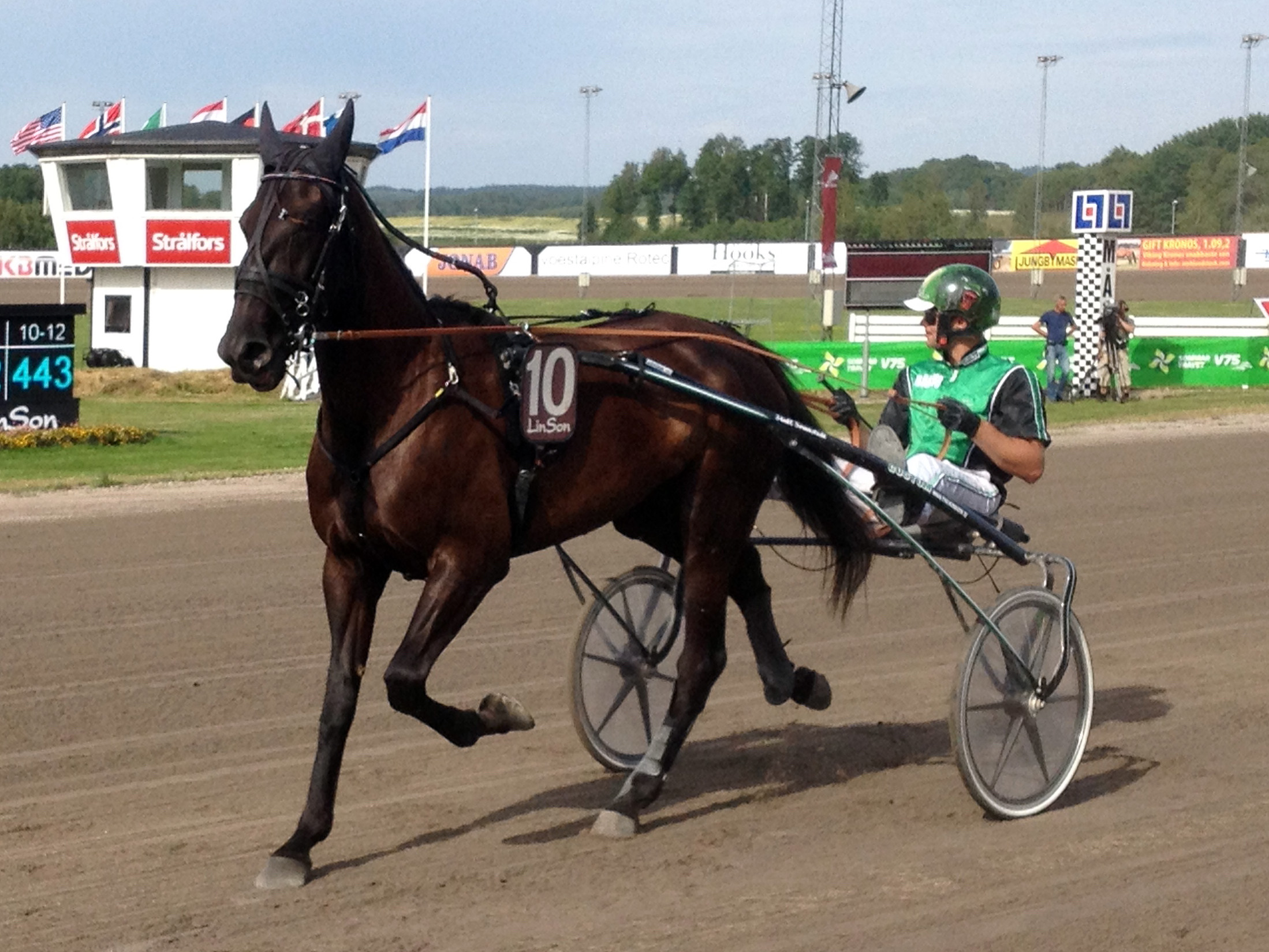 Anders Svanstedt med Lottie Palema på Halmstadtravet 2014.